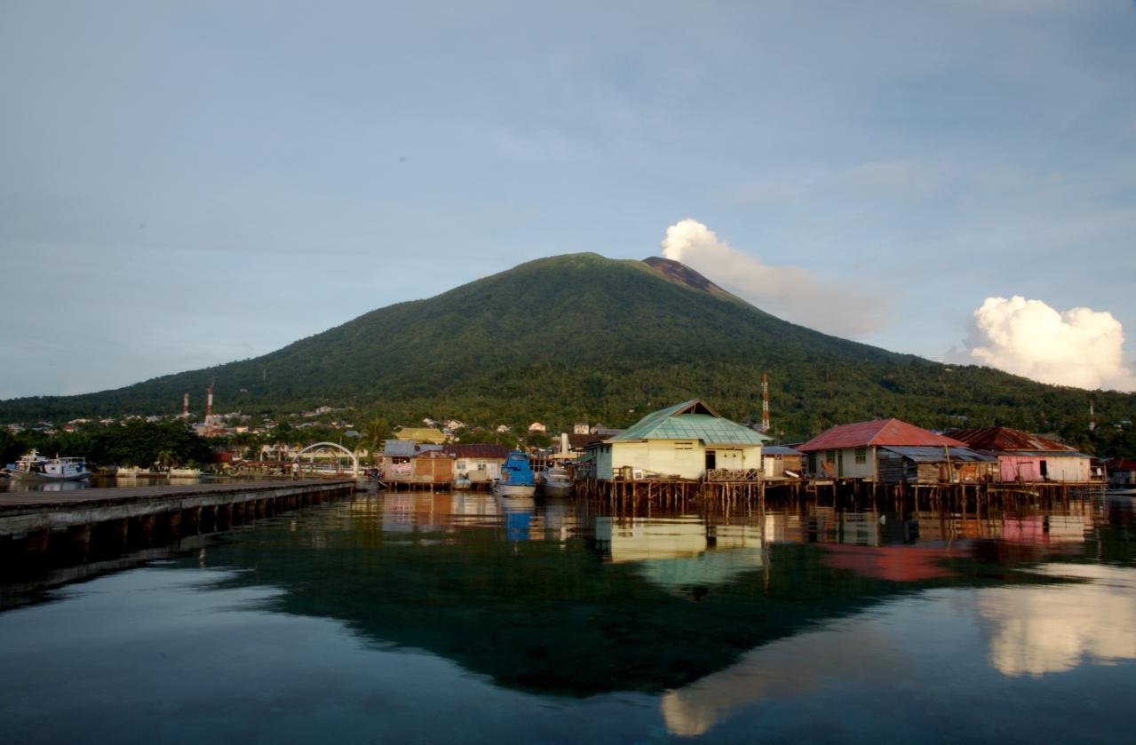 Gamalama Volcano view from Dodoku Ali wooden harbor